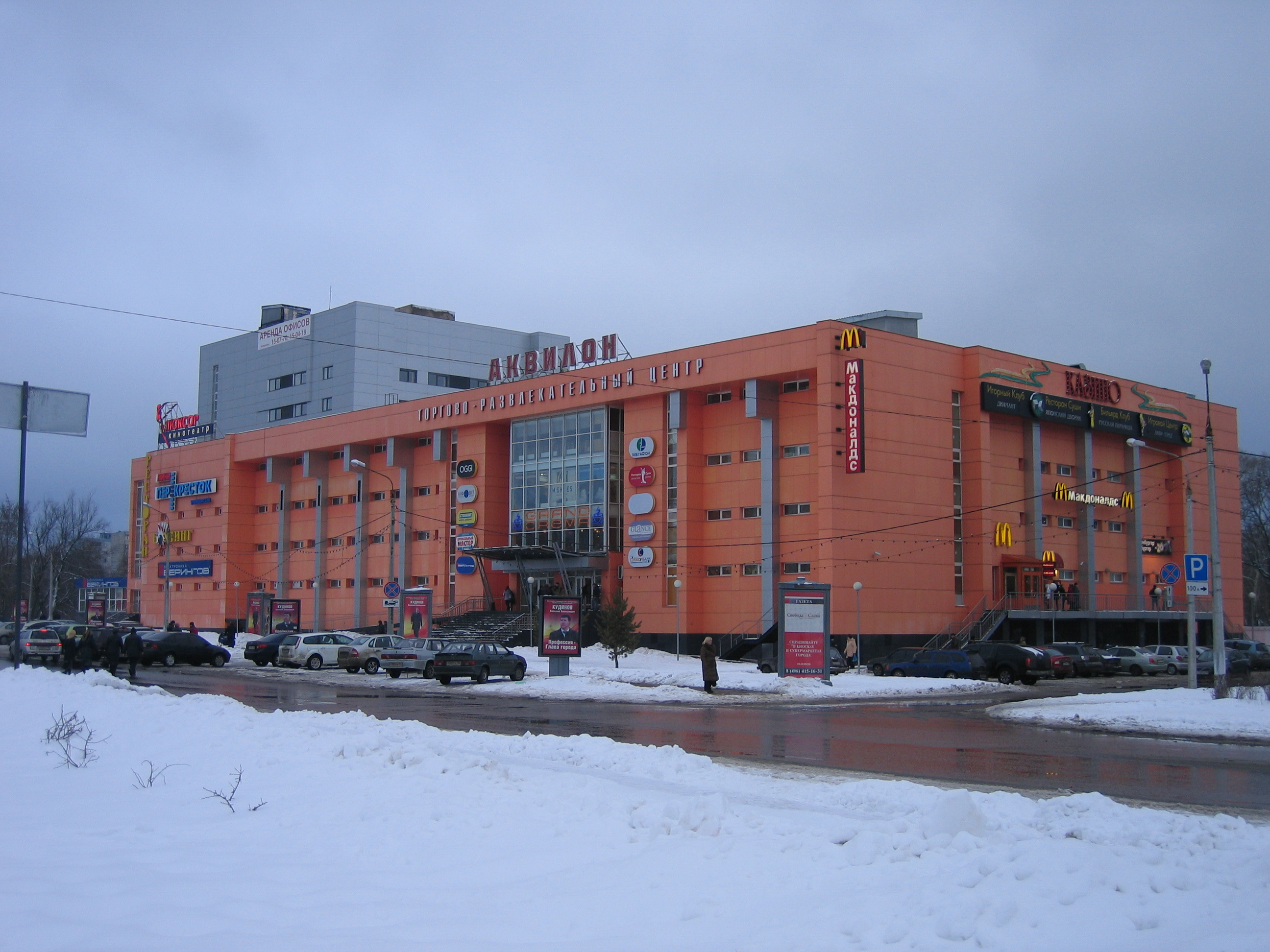 Ein Einkaufszentrum in Orechowo-Sujewo, Russland